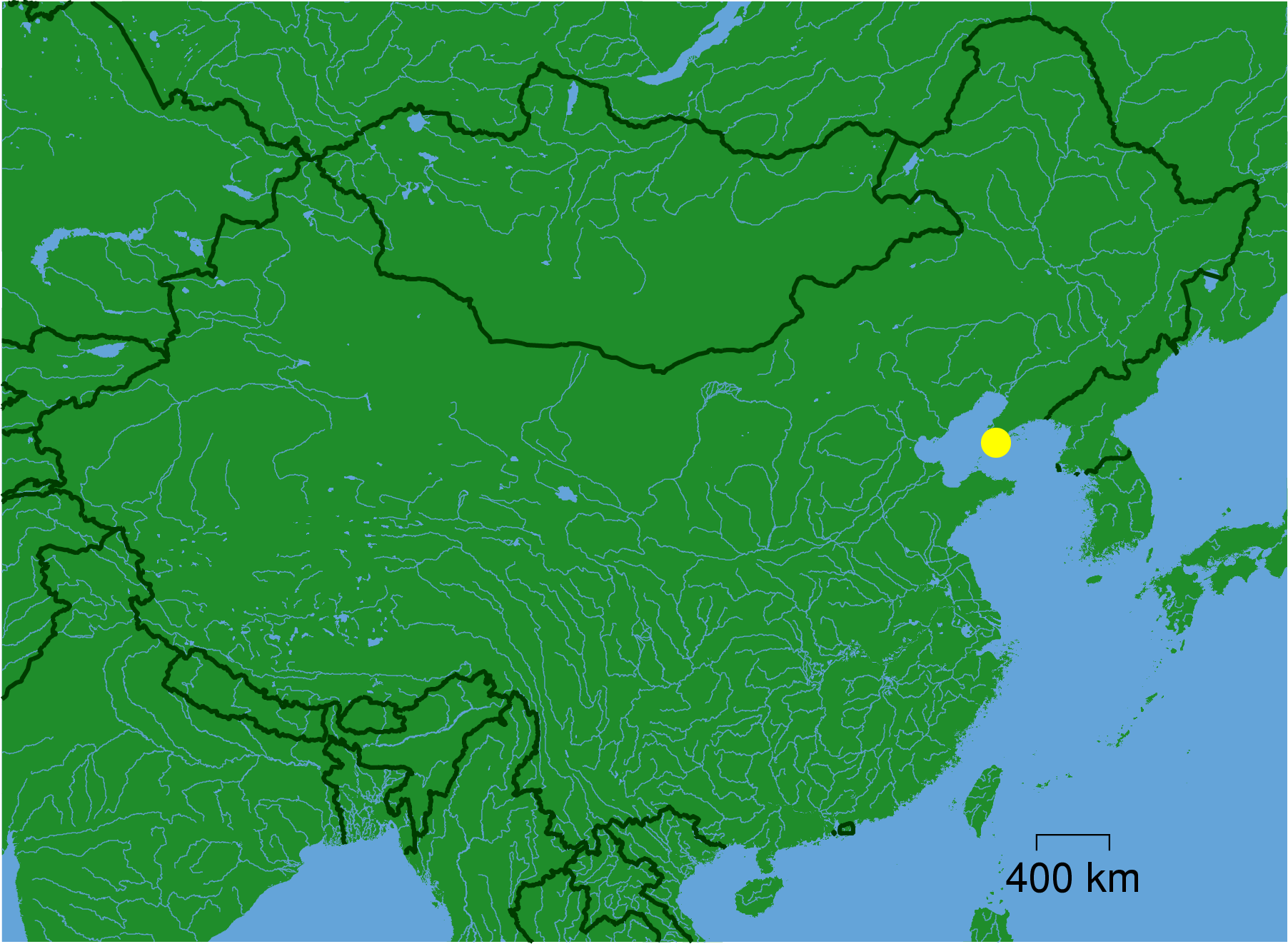 Category:ZHdot